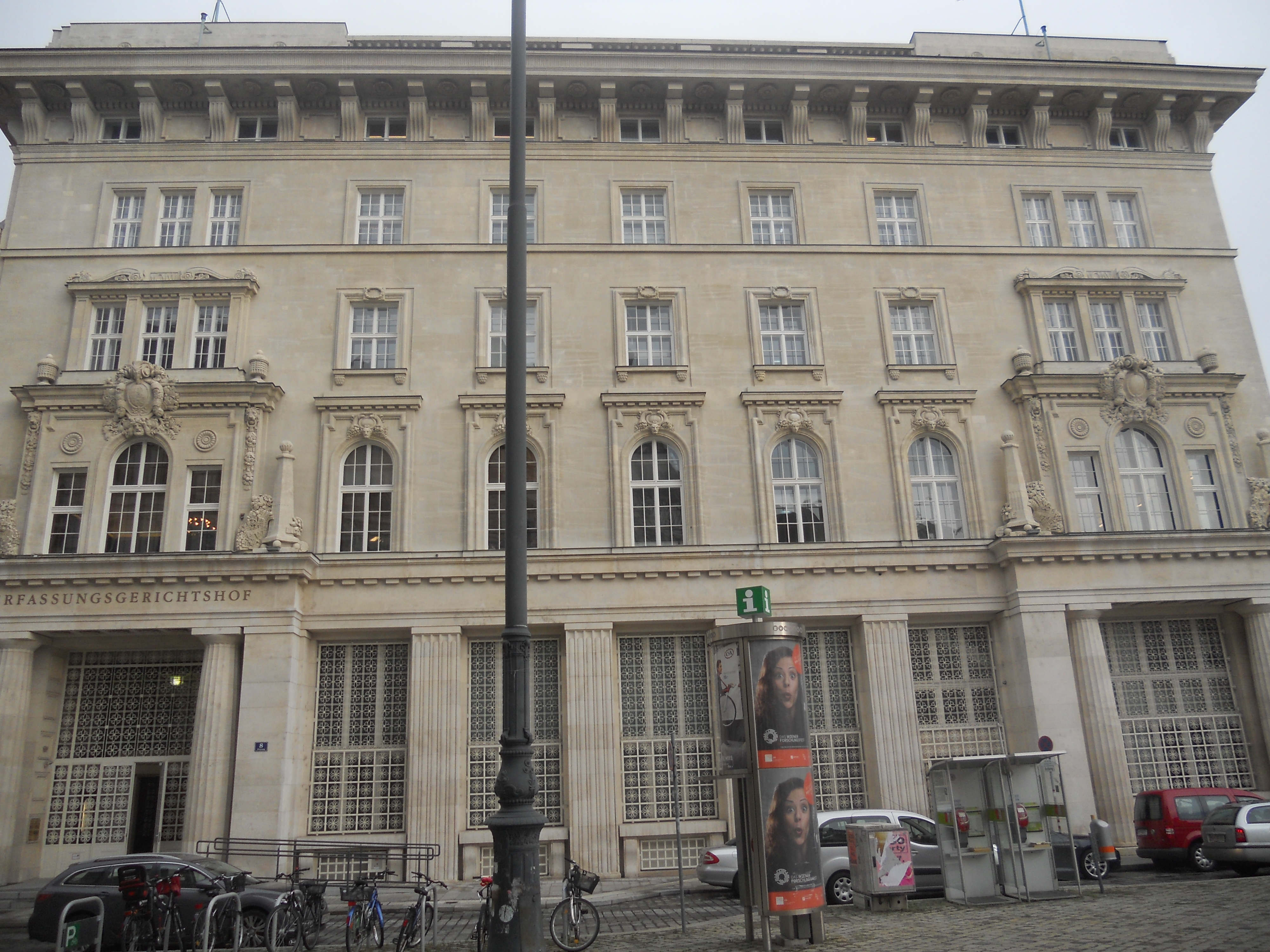 Sitz des österreichischen Verfassungsgerichtshofes, Wien 1., Renngasse 2. Im Erdgeschoß befinden sich mit dem Eingang rechts um die Ecke, Freyung 8, die Ausstellungsräume des Bank Austria Kunstforums.